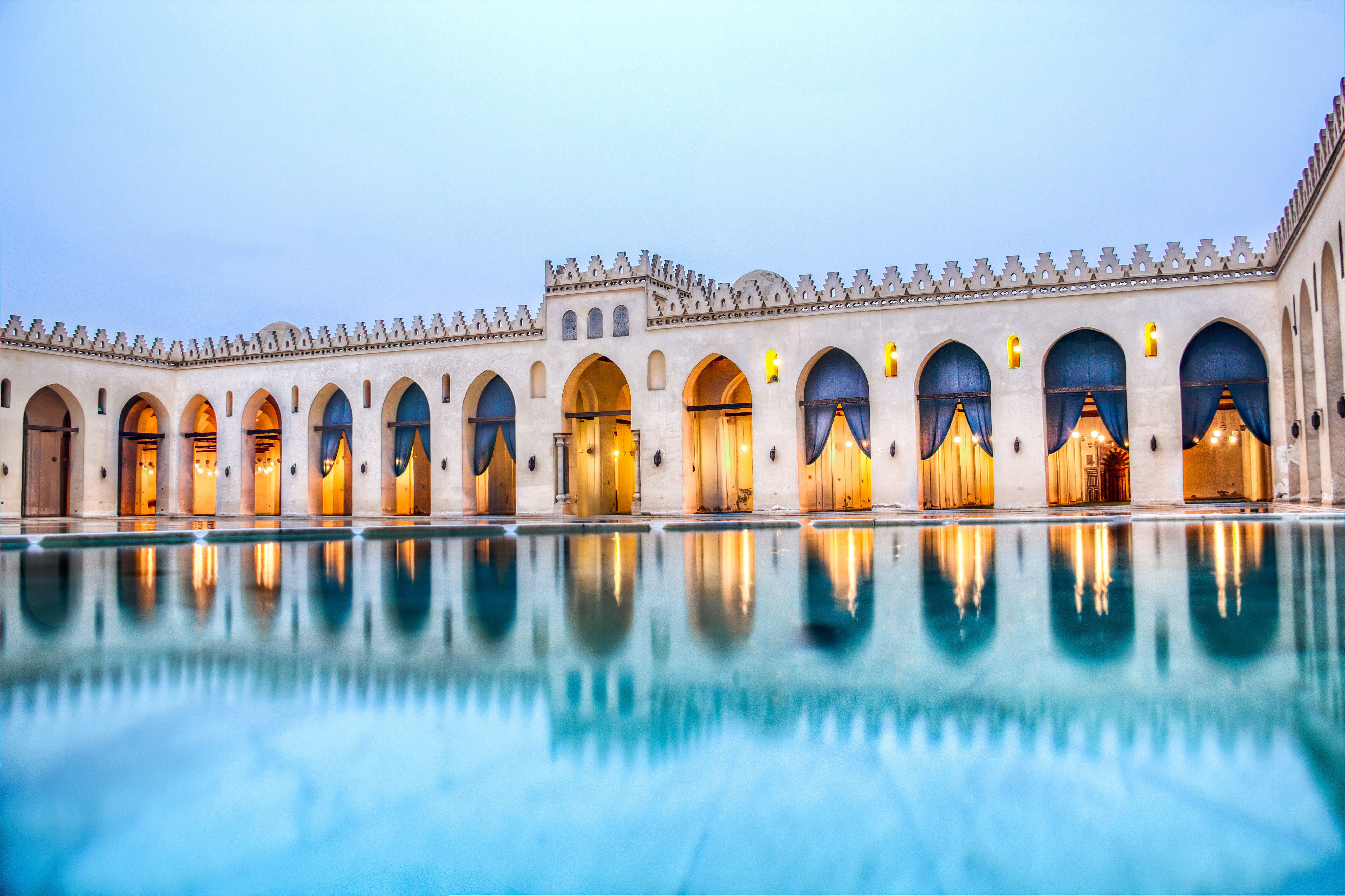 انعاكس مسجد الحاكم بوجودة نافورة